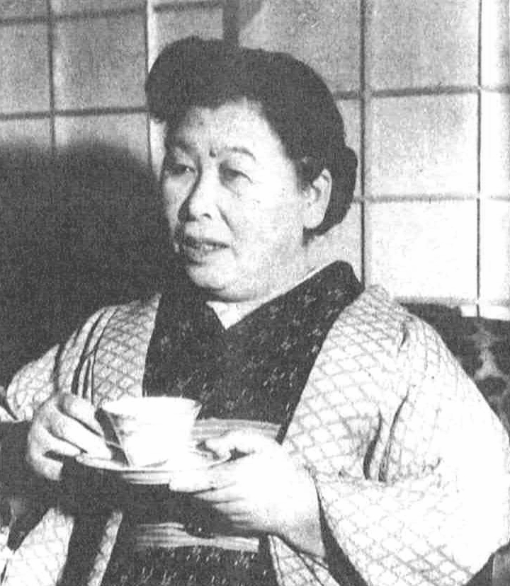 読売新聞社『家庭よみうり』334号（1953年）より村岡花子